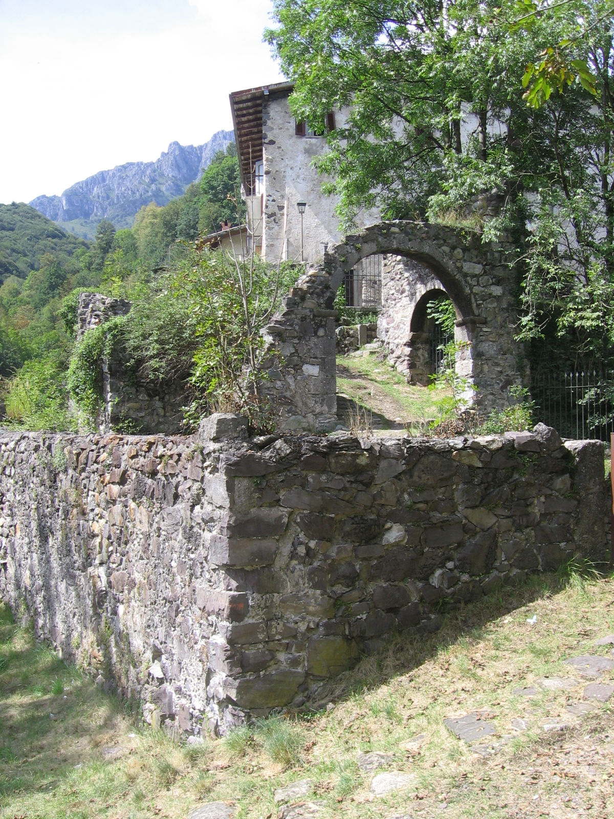 Cornello dei Tasso, Camerata Cornello, Bergamo, Italy